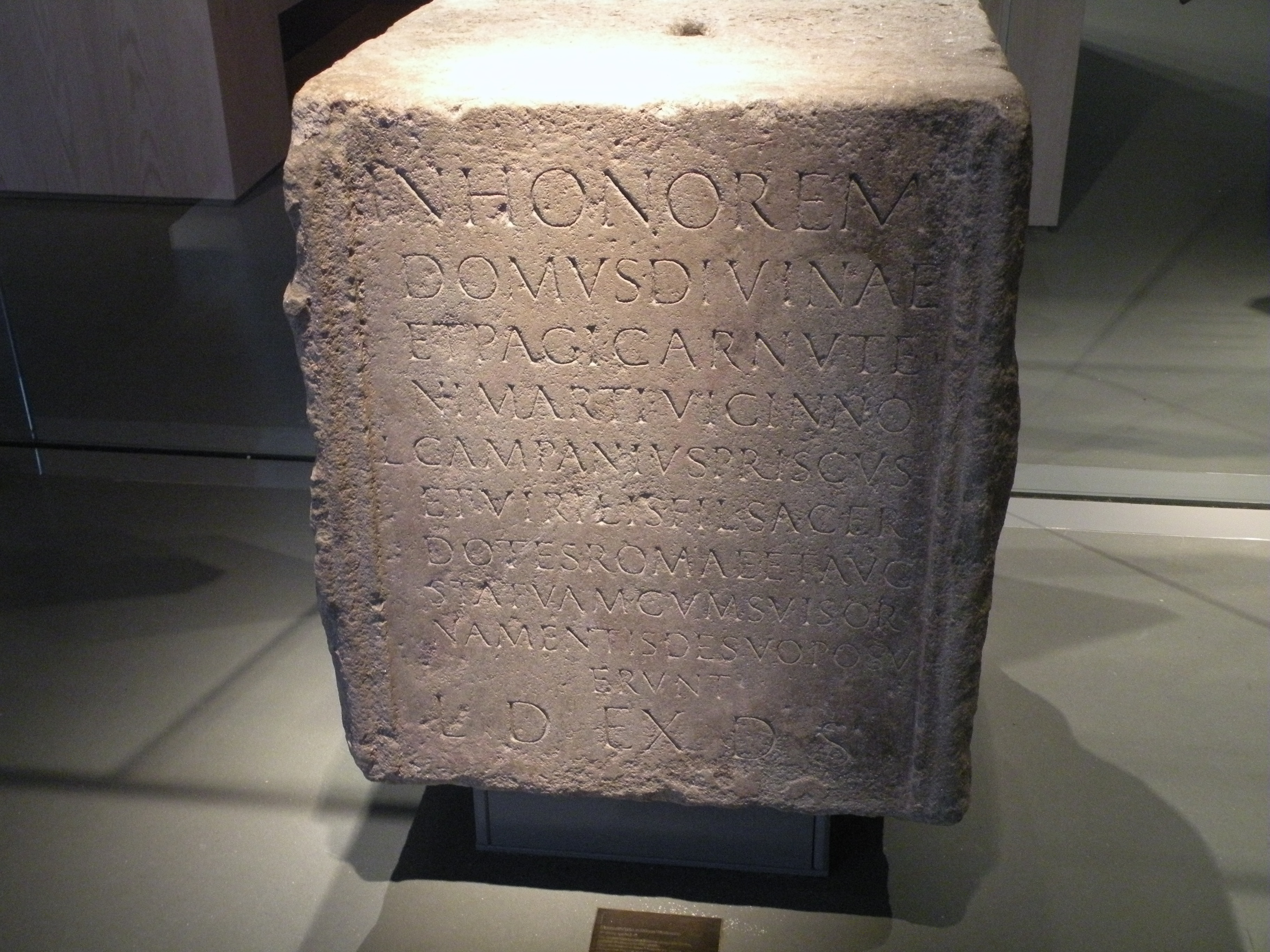 Base avec inscription dédiée à Mars Vicinnus, trouvée en 1896 au fond d'une cour basse d'une des maisons formant le côté Sud de la place des Lices(cf. Bulletin et mémoires de la Société archéologique du département d'Ille-et-Vilaine, 26, 1897), à quelques mètres des découvertes faites lors des travaux de construction des nouveaux bâtiments du Bazar Parisien, en 1890.